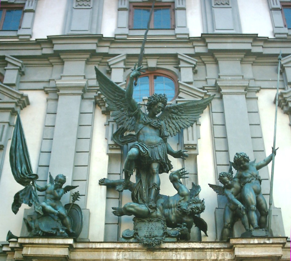 Der Erzengel Michael ringt (mit etwas unfairen Mitteln;-) mit dem Teufel über dem Ost-Portal des Augsburger Zeughauses (vgl. Augsburger Turamichele und Augsburger Knotenlöserin)